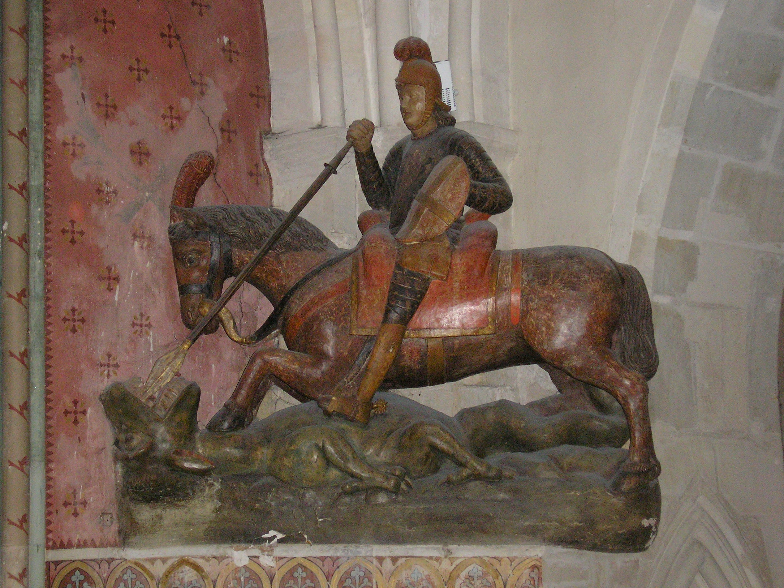 Saint-Georges-d'Aunay (Normandie, France). Statue de saint Georges terrassant le dragon dans l'église Saint-Georges.